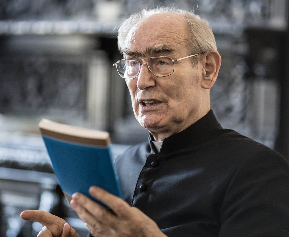 Alfons Nossol